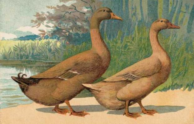 Orpingtonenten: Erpel (li.) und Ente (re.)Farblithographie, 1890, 10x14 cm